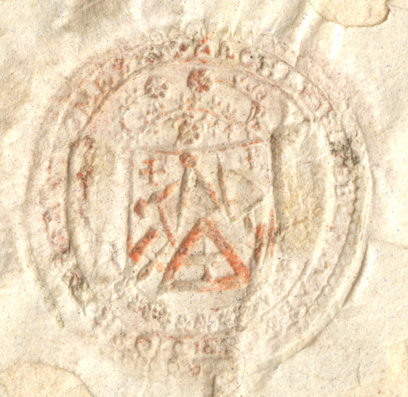 Pečeť cechu zedníků a pokrývačů v Chomutově